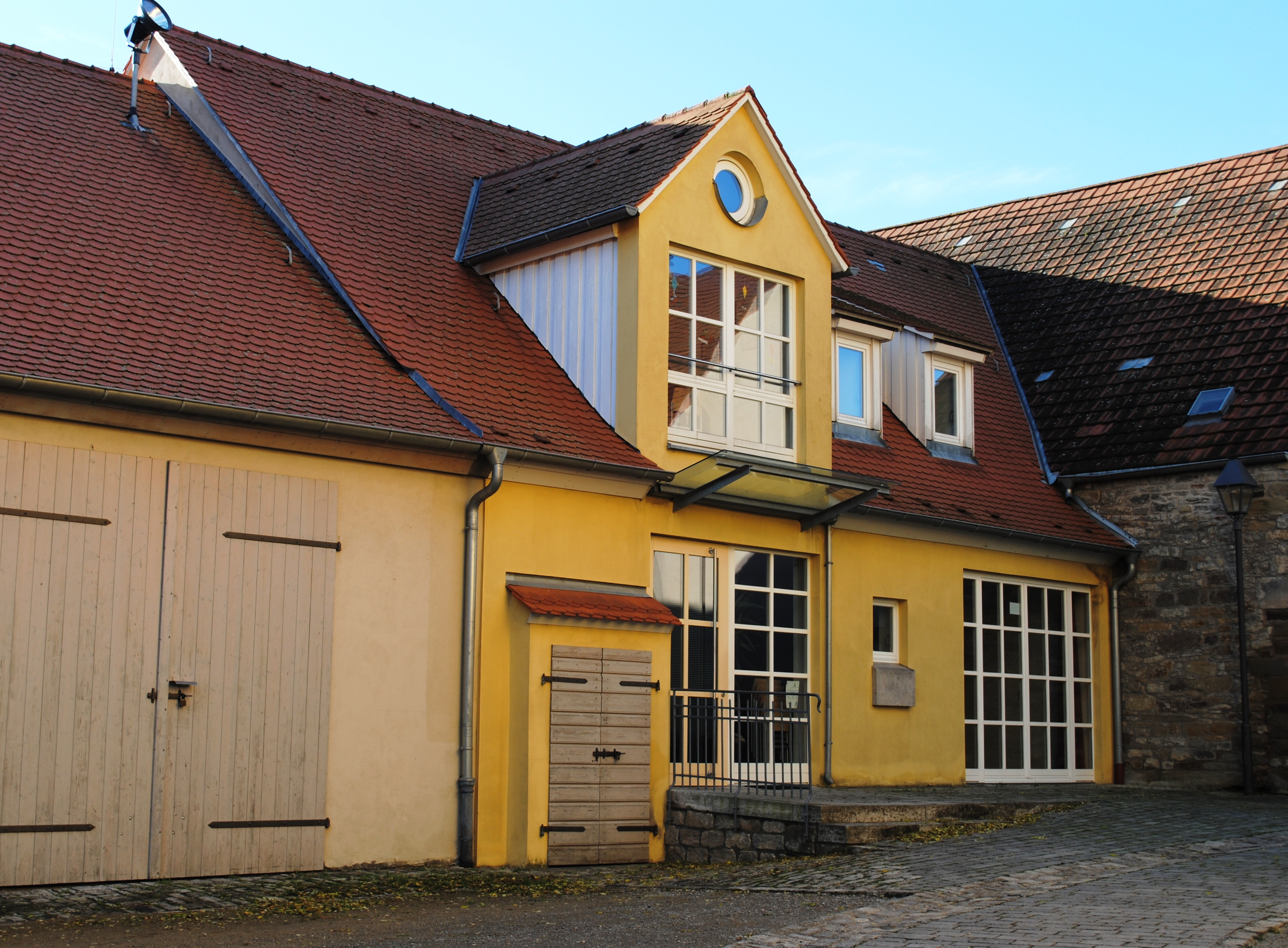 Martinushaus, Kath. Pfarrzentrum, Süden, Willanzheim